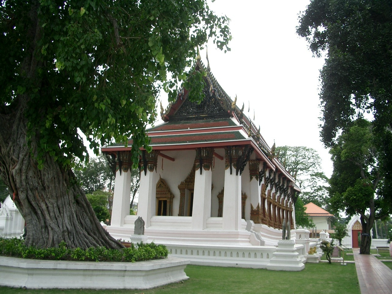 พระอุโบสถวัดสุสรรณดาราม จังหวัดพระนครศรีอยุธยา - Phra Ubosot in Wat Suwan Dararam, Ayutthaya, Thailand ถ่ายโดยวลัยภรณ์ นาคพันธุ์ เมื่อ 25 มีนาคม 2549